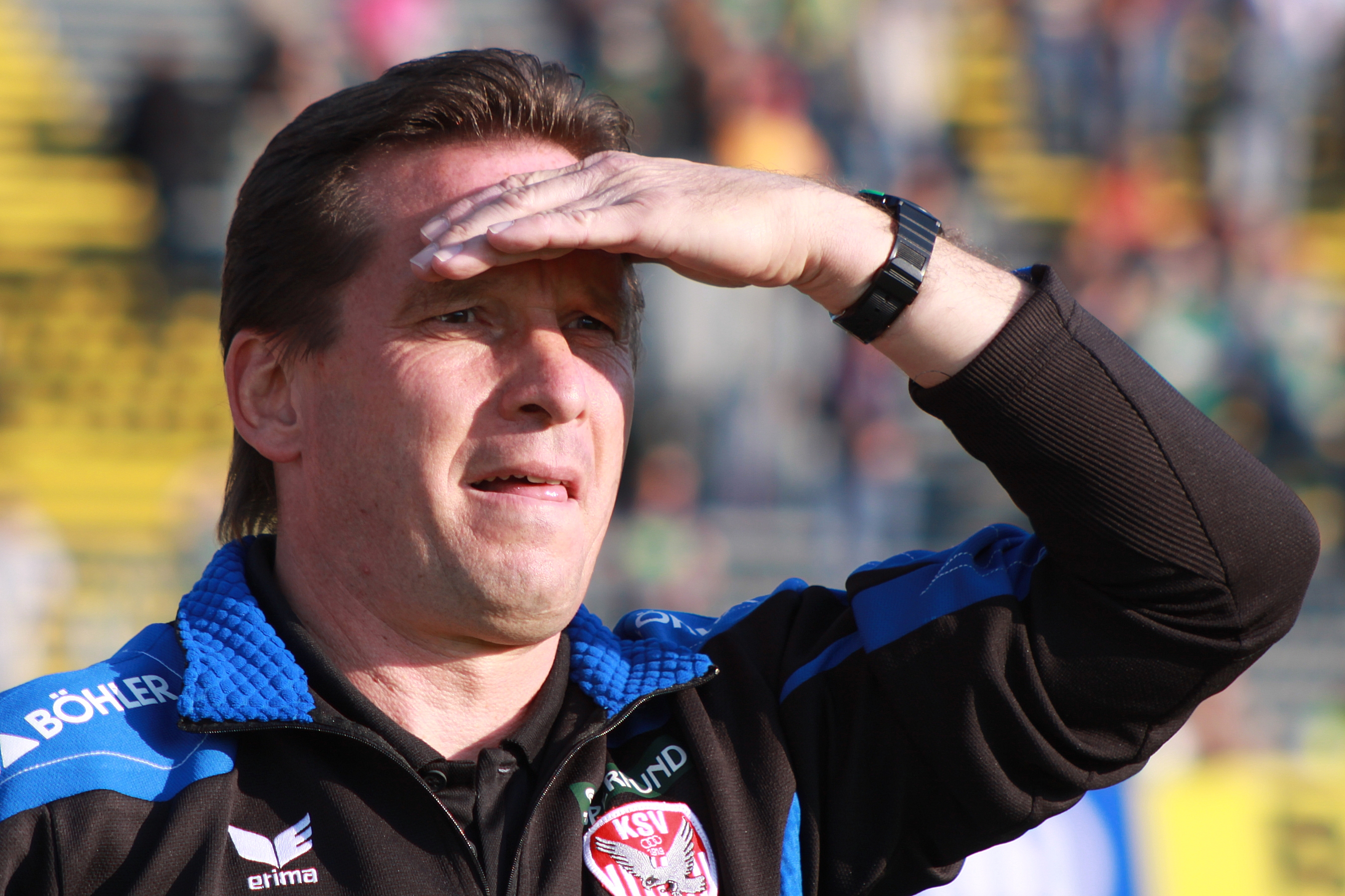 Werner Gregoritsch, Trainer – Kapfenberger SV (Bild 3)